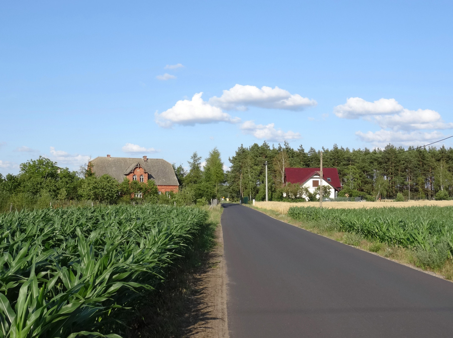 Dobromierz, gmina Nowa Wieś Wielka, powiat bydgoski